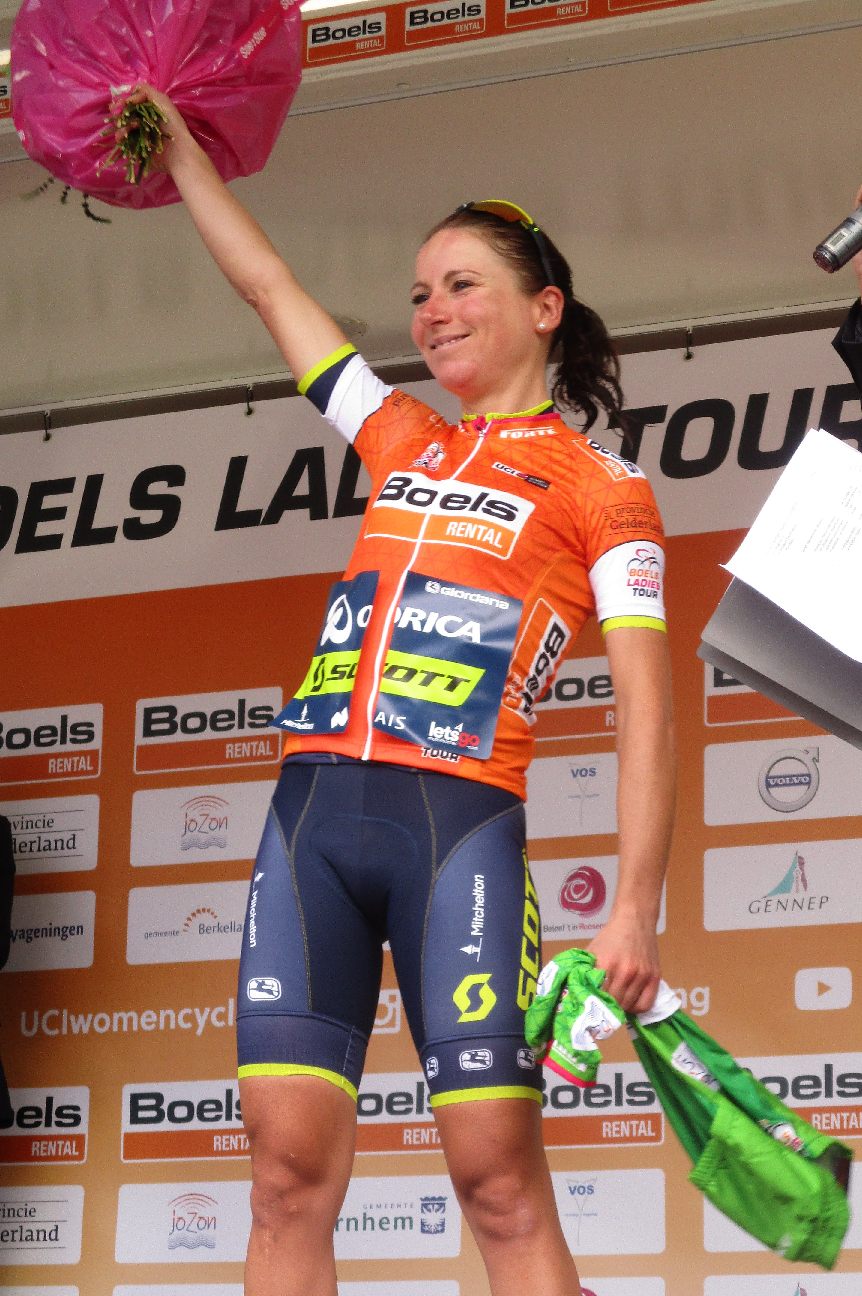 Huldiging van de winnaars van de 5e etappe van de Boels Ladies Tour 2017 in Vaals.